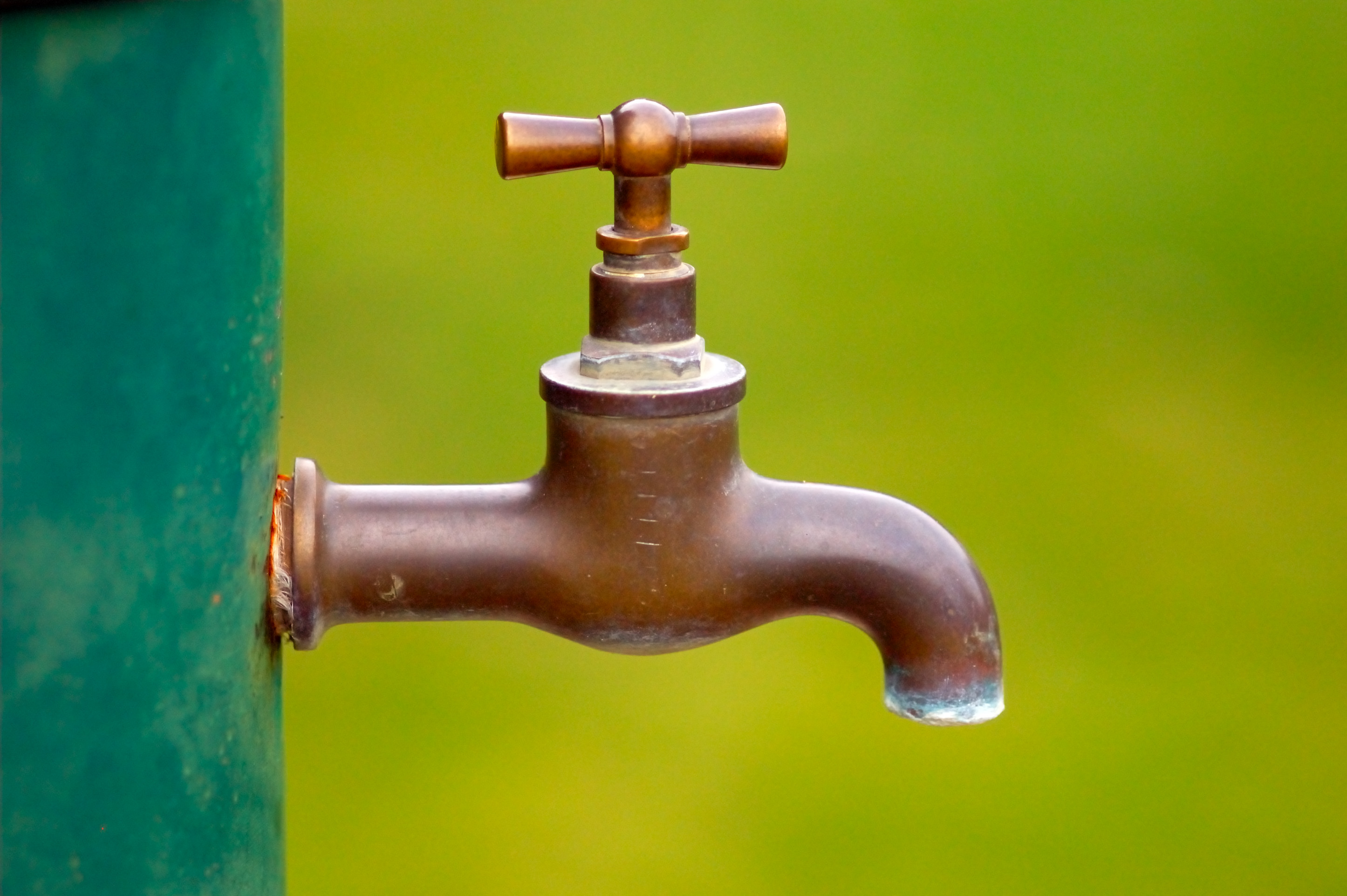 Componente de latón.